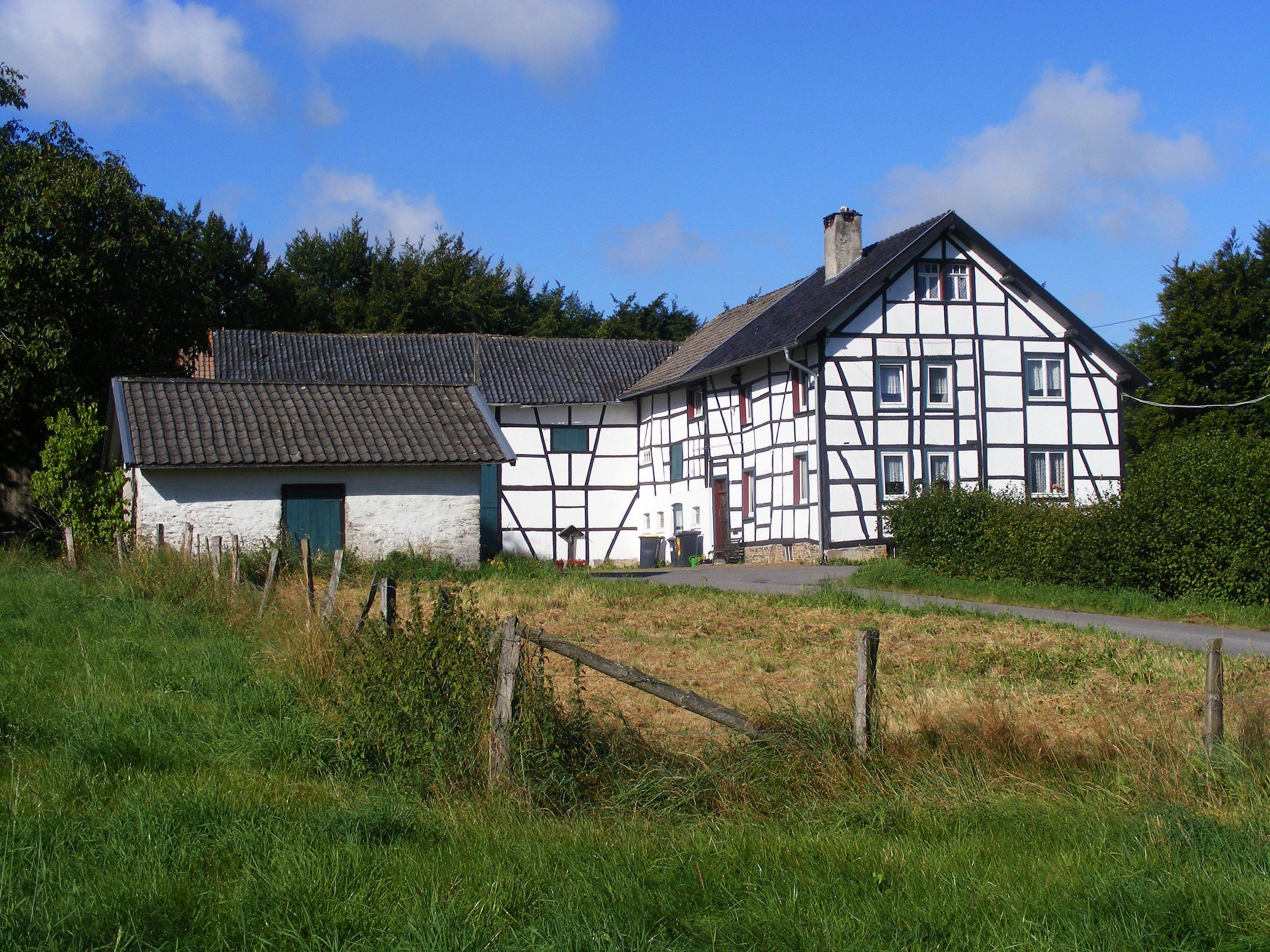 Winkelhofanlage Simmerath Huppenbroich Kuhl 14This is a photograph of an architectural monument., no. 133